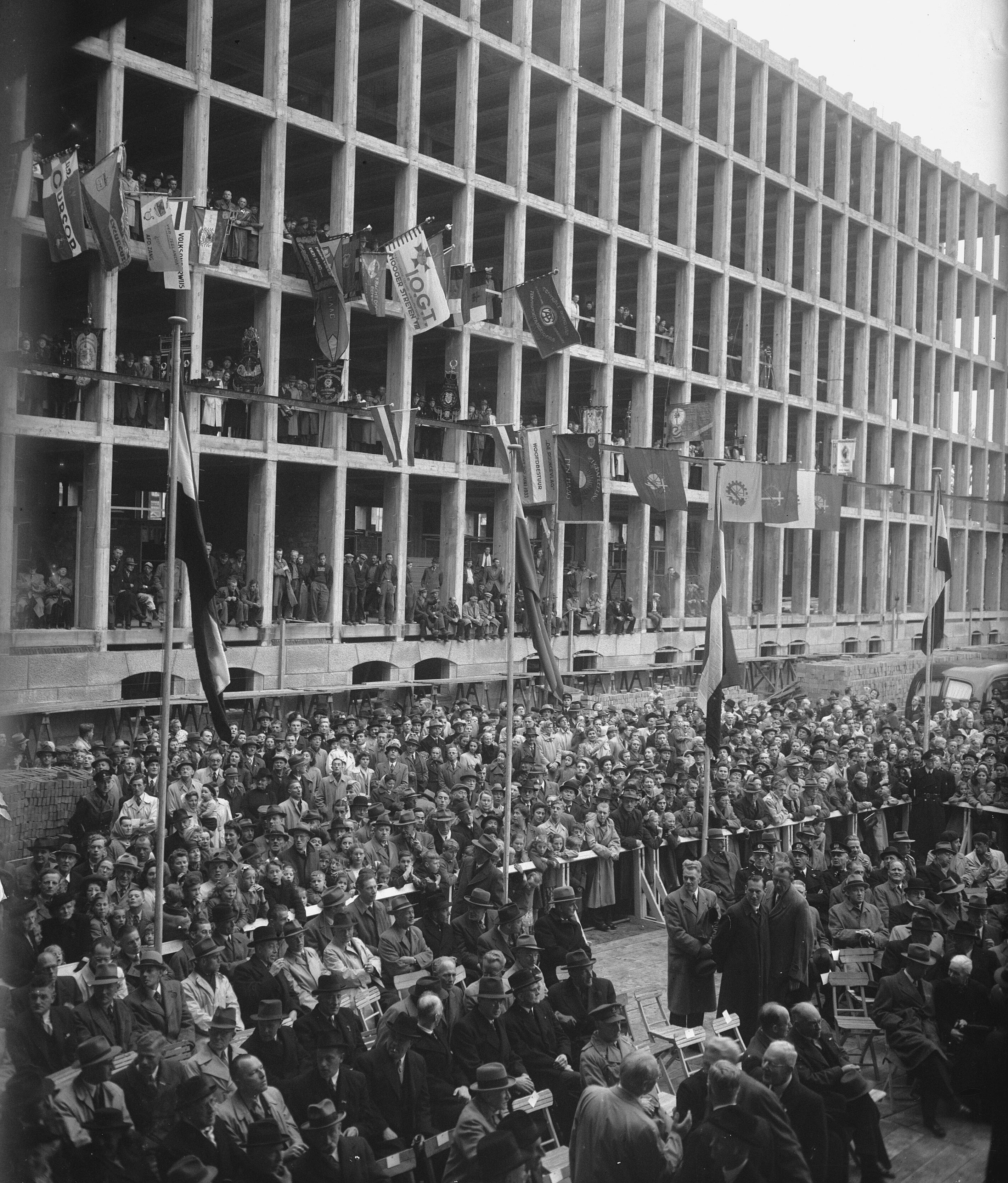 Collectie / Archief : Fotocollectie Anefo Reportage / Serie : [ onbekend ] Beschrijving : Eerste steen Stadhuis Alexanderveld Den Haag Datum : 5 mei 1949 Locatie : Den Haag, Zuid-Holland Fotograaf : Merk, Ben / Anefo Auteursrechthebbende : Nationaal Archief Materiaalsoort : Glasnegatief Nummer archiefinventaris : bekijk toegang 2.24.01.09 Bestanddeelnummer : 903-3634